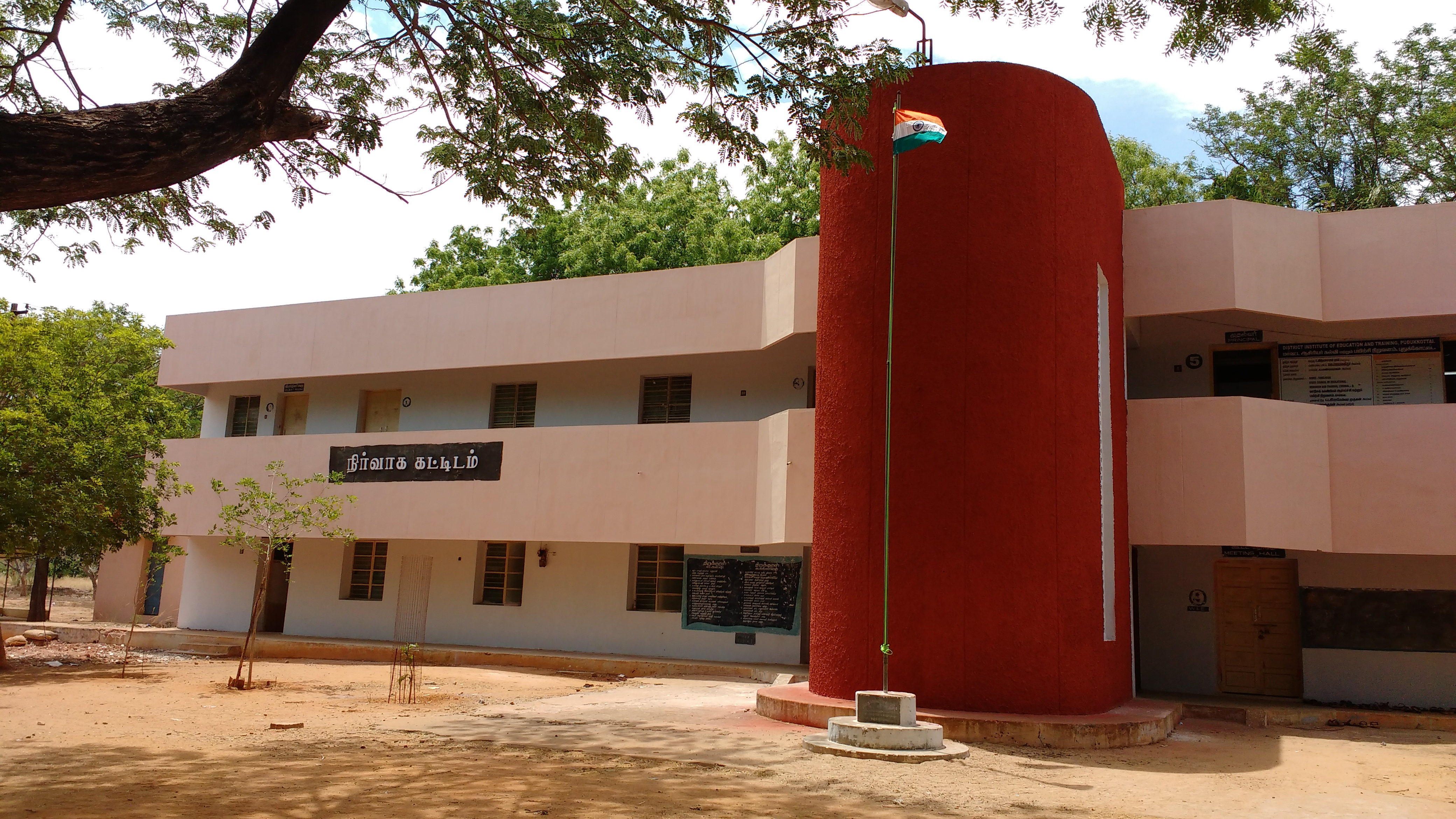 மாவட்ட ஆசிரியர் கல்வி மற்றும் பயிற்சி நிறுவனம்,புதுக்கோட்டை